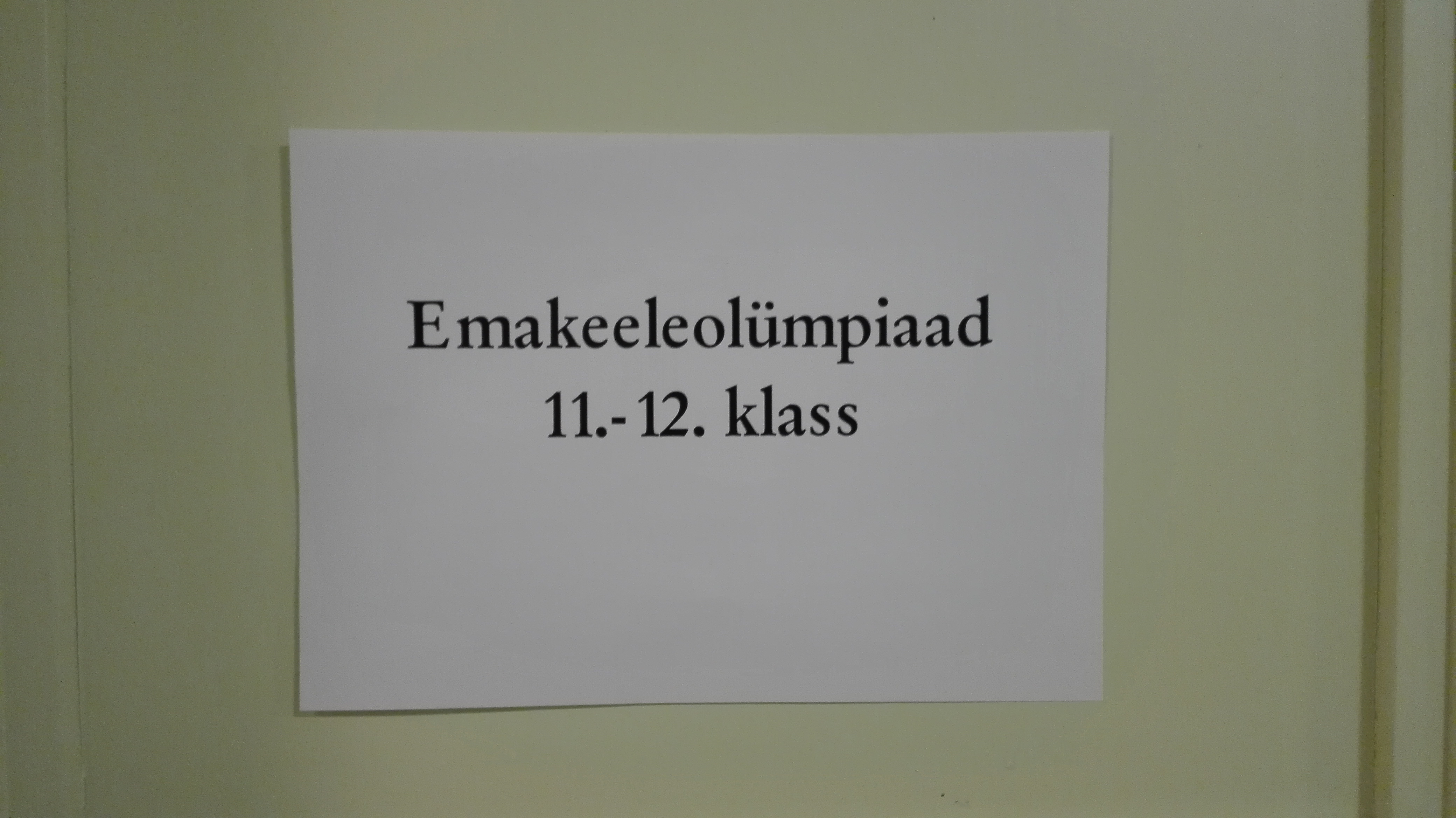 Emakeeleolümpiaadi vanema vanuserühma silt 2018. aastal.